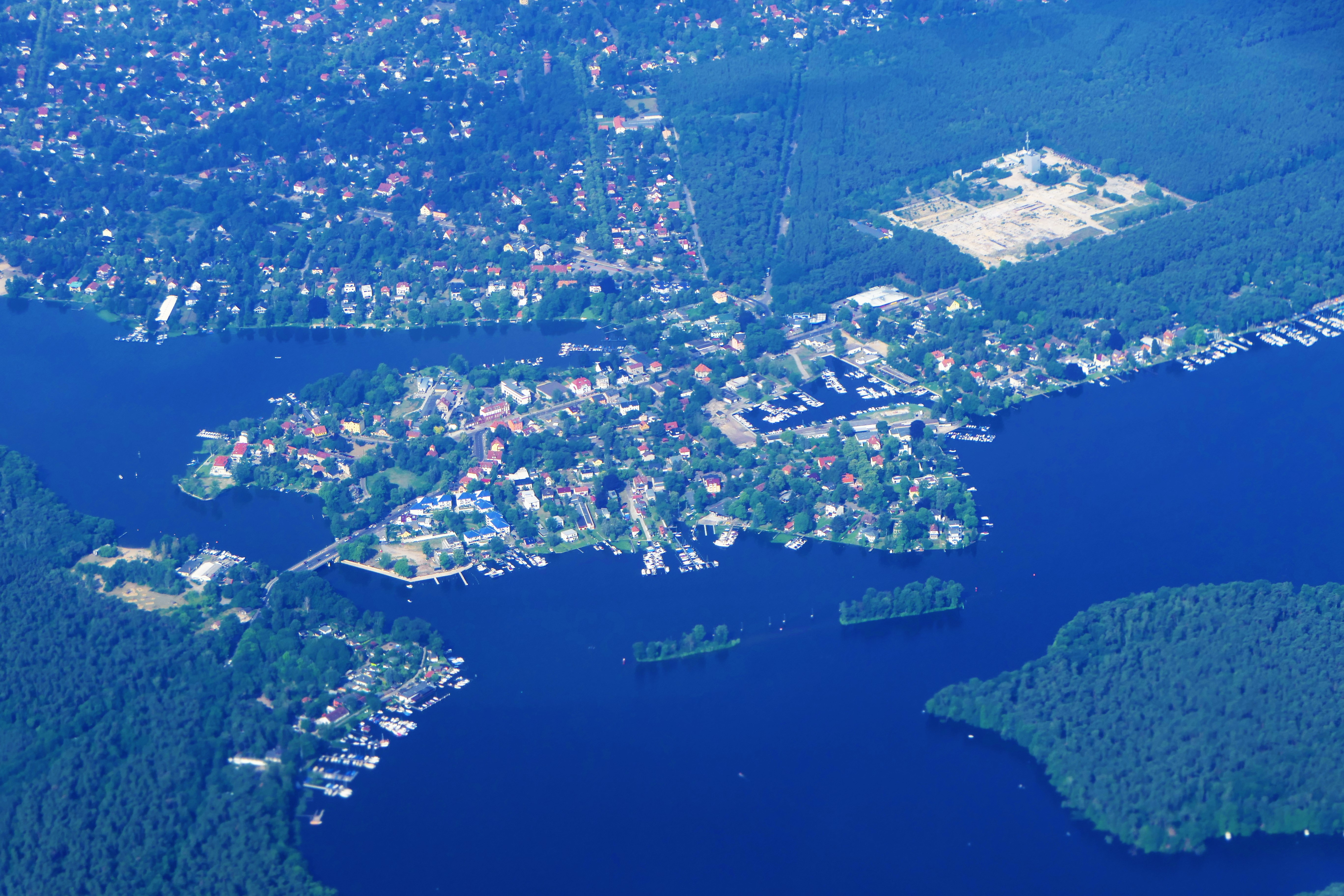 Luftbild von Berlin-Schmöckwitz - Alt-Schmöckwitz, im Hintergrund Eichwalde